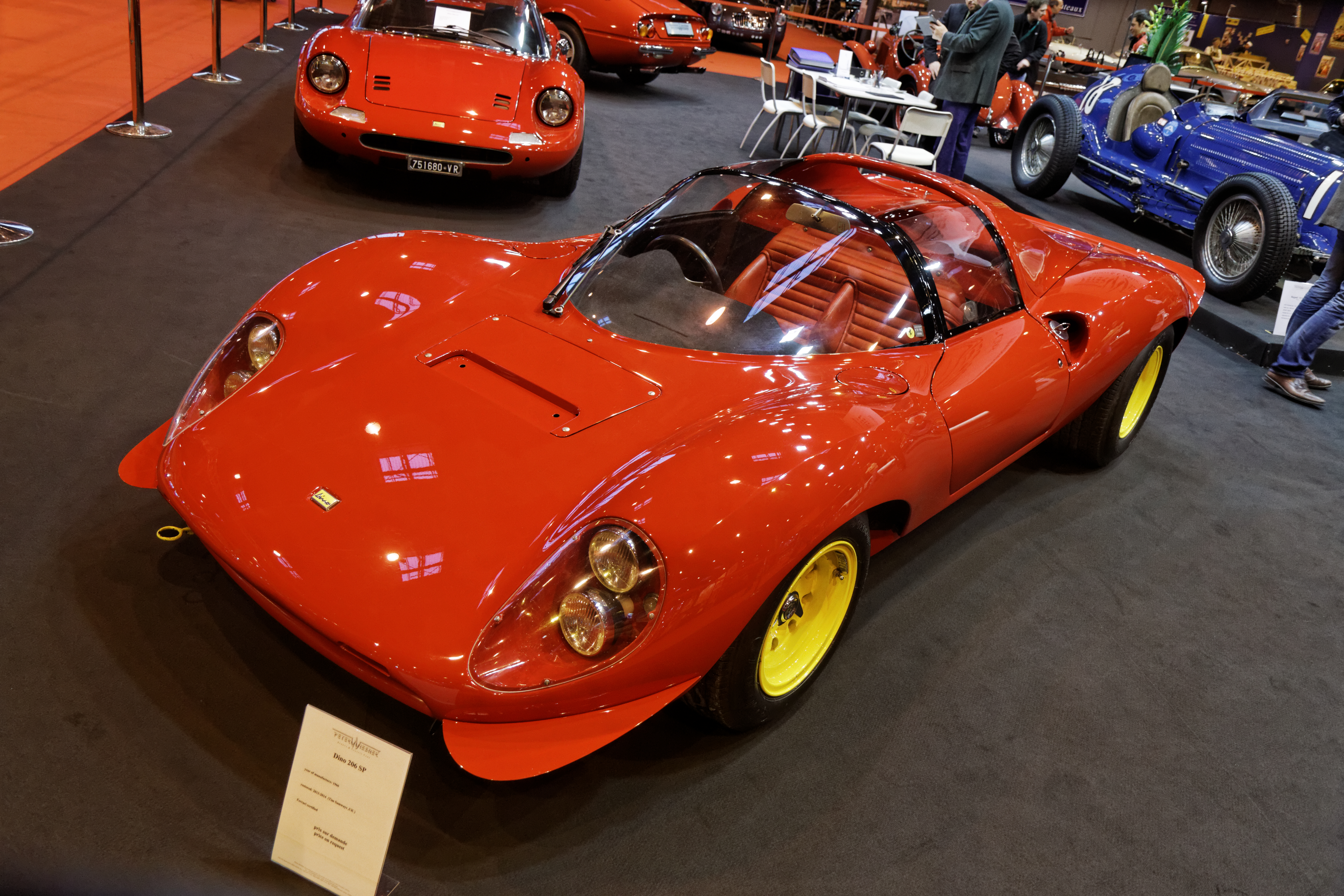 Une Dino 206 SP présenté lors du salon Retromobile 2014.